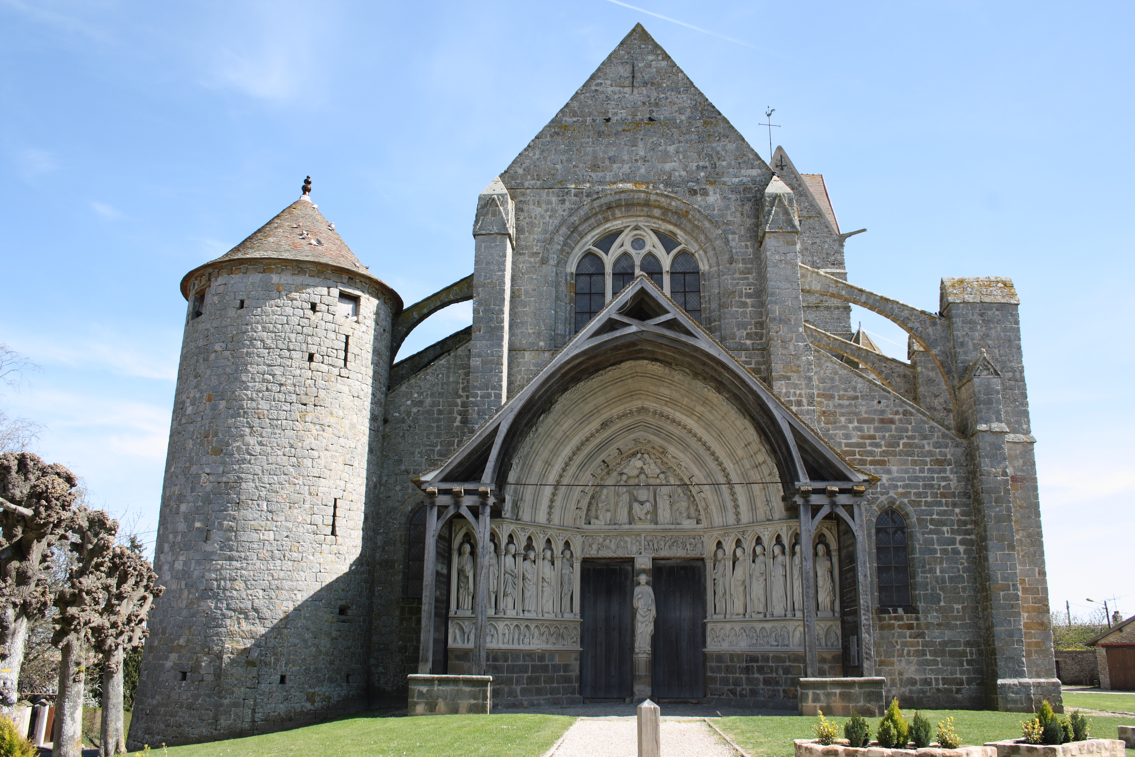 Katholische Pfarrkirche Saint-Eliphe in Rampillon, einer Gemeinde im Département Seine-et-Marne (Île-de-France), Westfassade